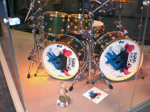 מערכת תופים בסגנון ג'ינג'ר בייקר